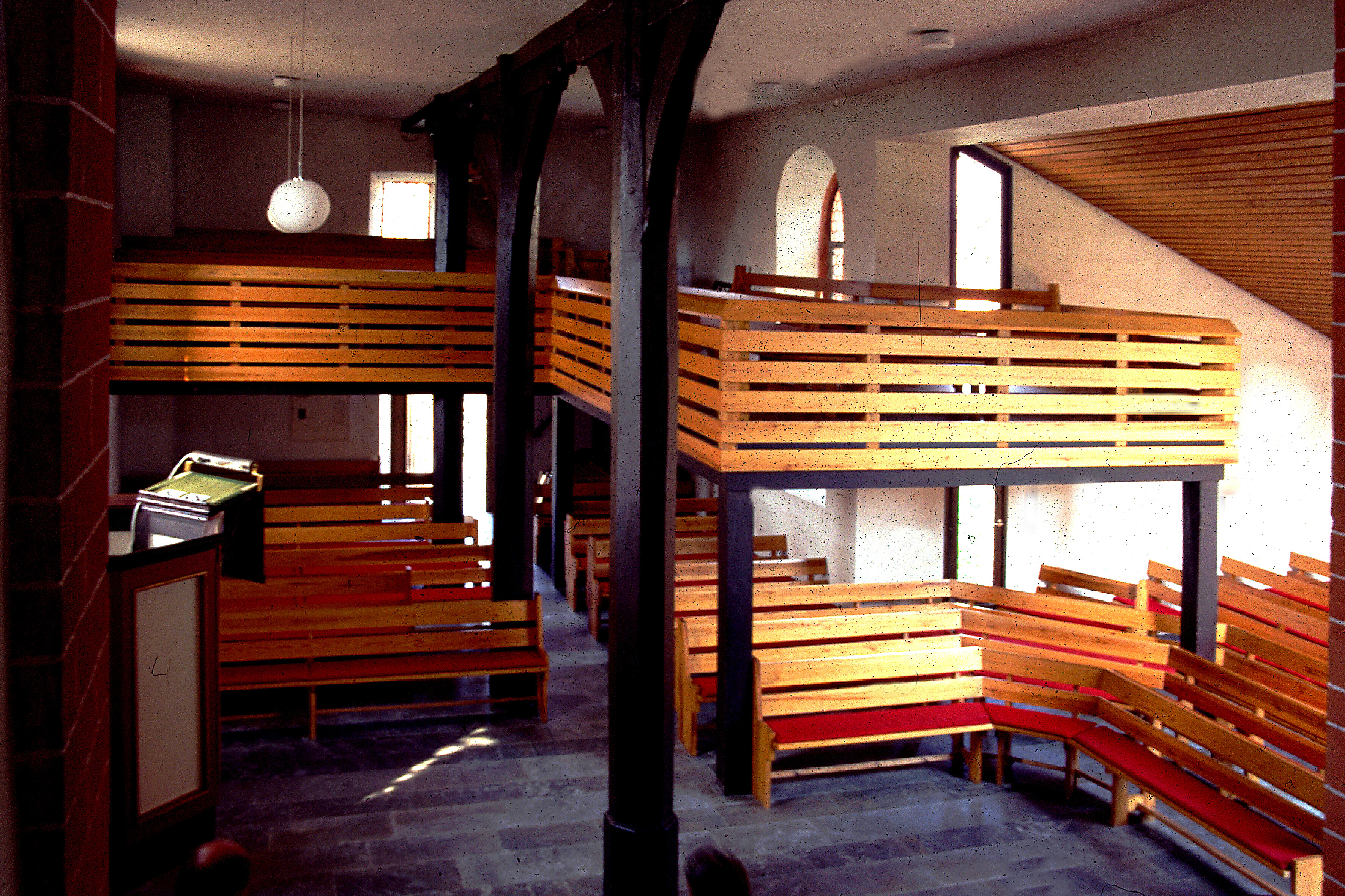 Evangelische Kirche Queckborn, Grünberg, Landkreis Gießen, Hessen, Deutschland